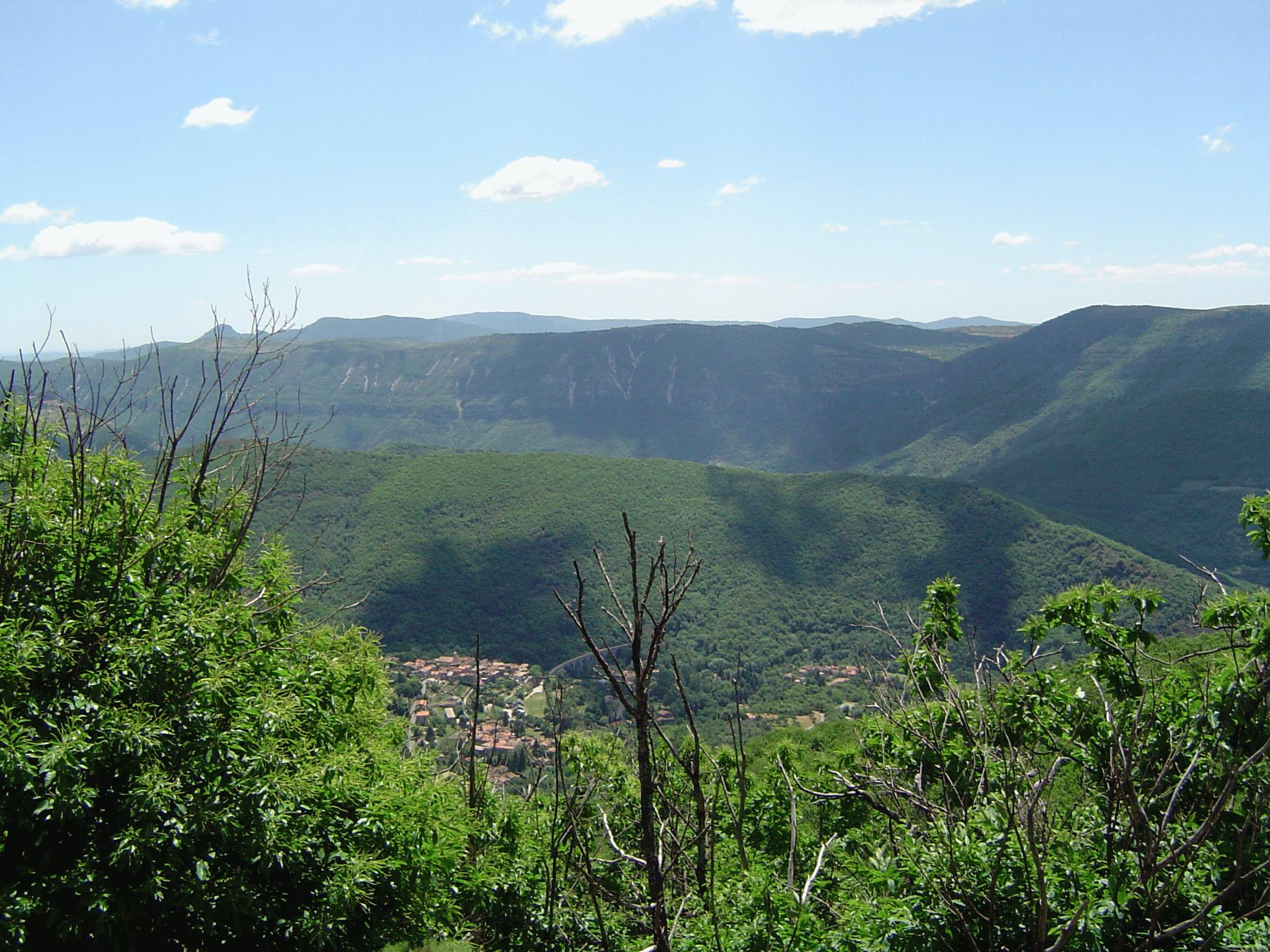 Vue sur le village français de Aumessas dans le Gard 2005. Cevenol2